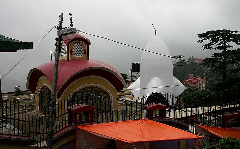 Kali Bari Shimla, Himacha Pradesh, India